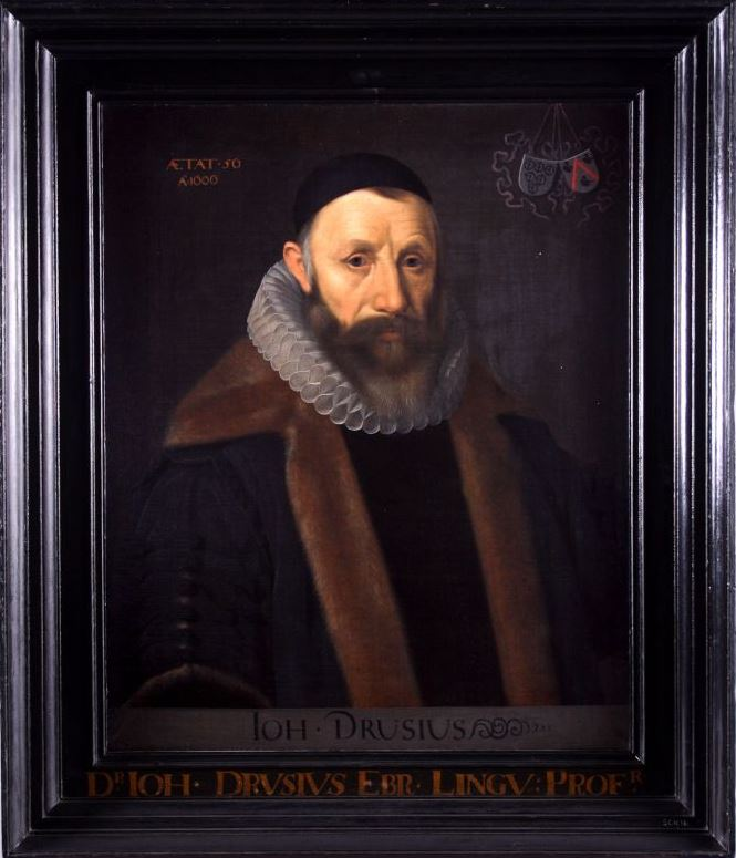 Portret in olieverf van Johannes Drusius, professor in de Oosterse talen aan de universiteit van Franeker van 1585 tot 1616. Johannes Drusius (Oudenaarde 28 juni 1550 - Franeker 12 februari 1616). Toen Drusius aangesteld werd in Franeker, was hij al een oriëntalist van grote naam en hoogleraar in Oxford en Leiden geweest. Hij werkte mee aan de Statenvertaling van de bijbel en werd voor dat doel vrijgesteld van collegeverplichtingen. (tekst Museum Martena)